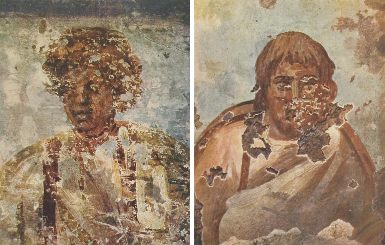 Nuntiatella catacombs, Rome, Christus Bilder